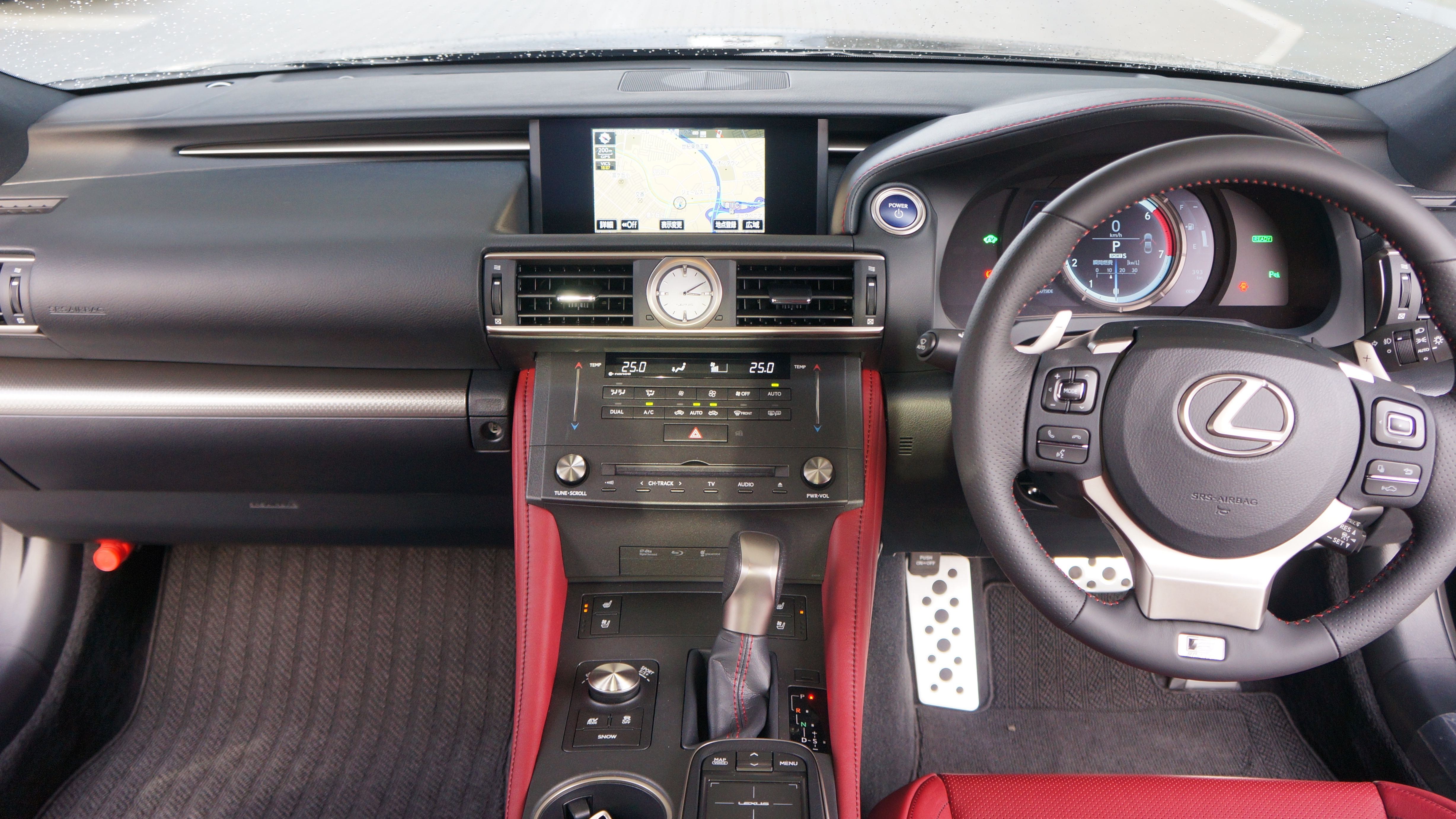 LEXUS RC300h F SPORT Japan 2014 Interior